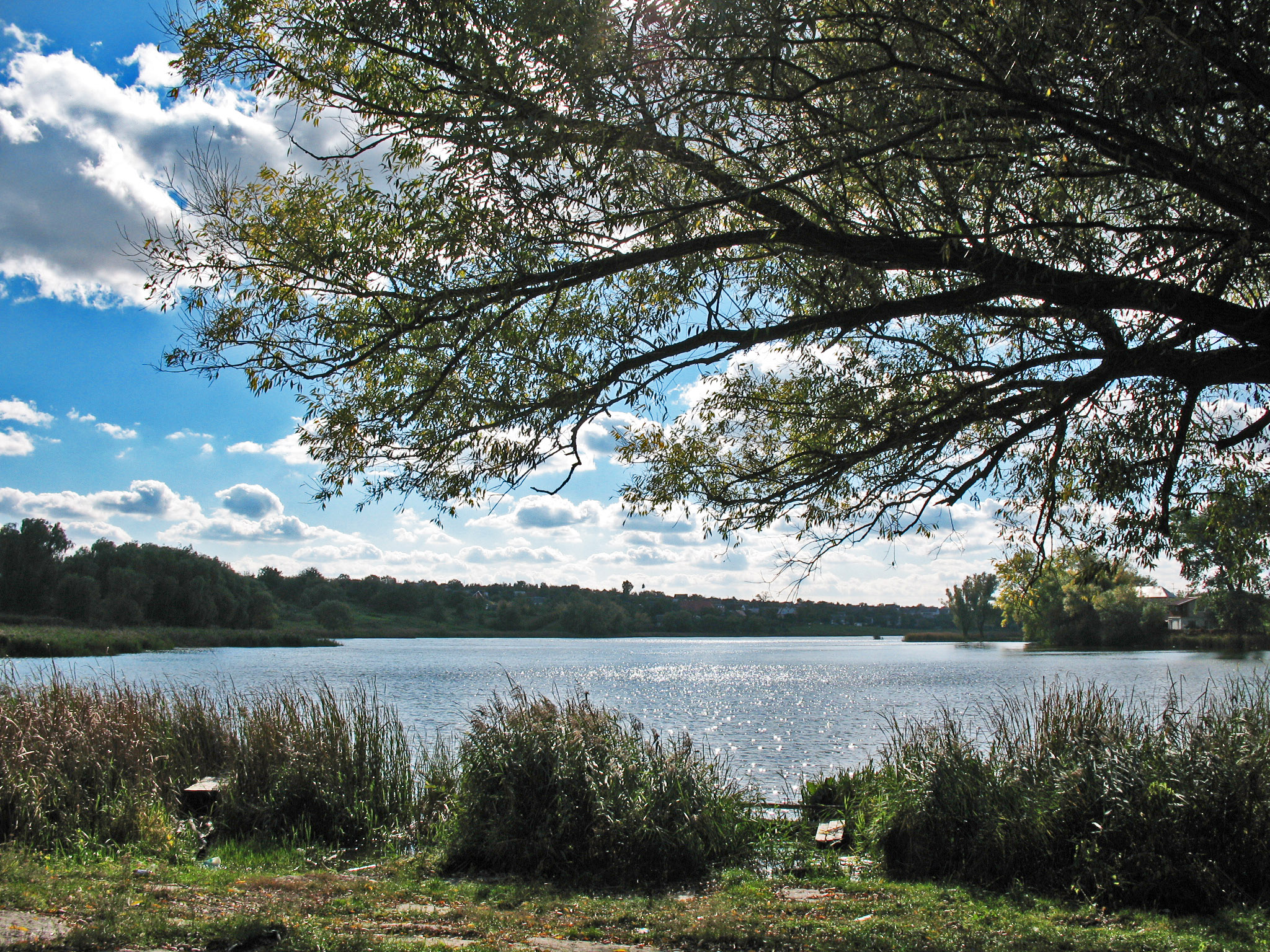 «Урочище Унава», Фастівський район, Волицька сільська рада